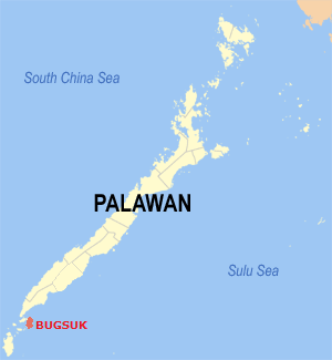 Localisation de l'île de Bugsuk, province de Palawan aux Phillipines.